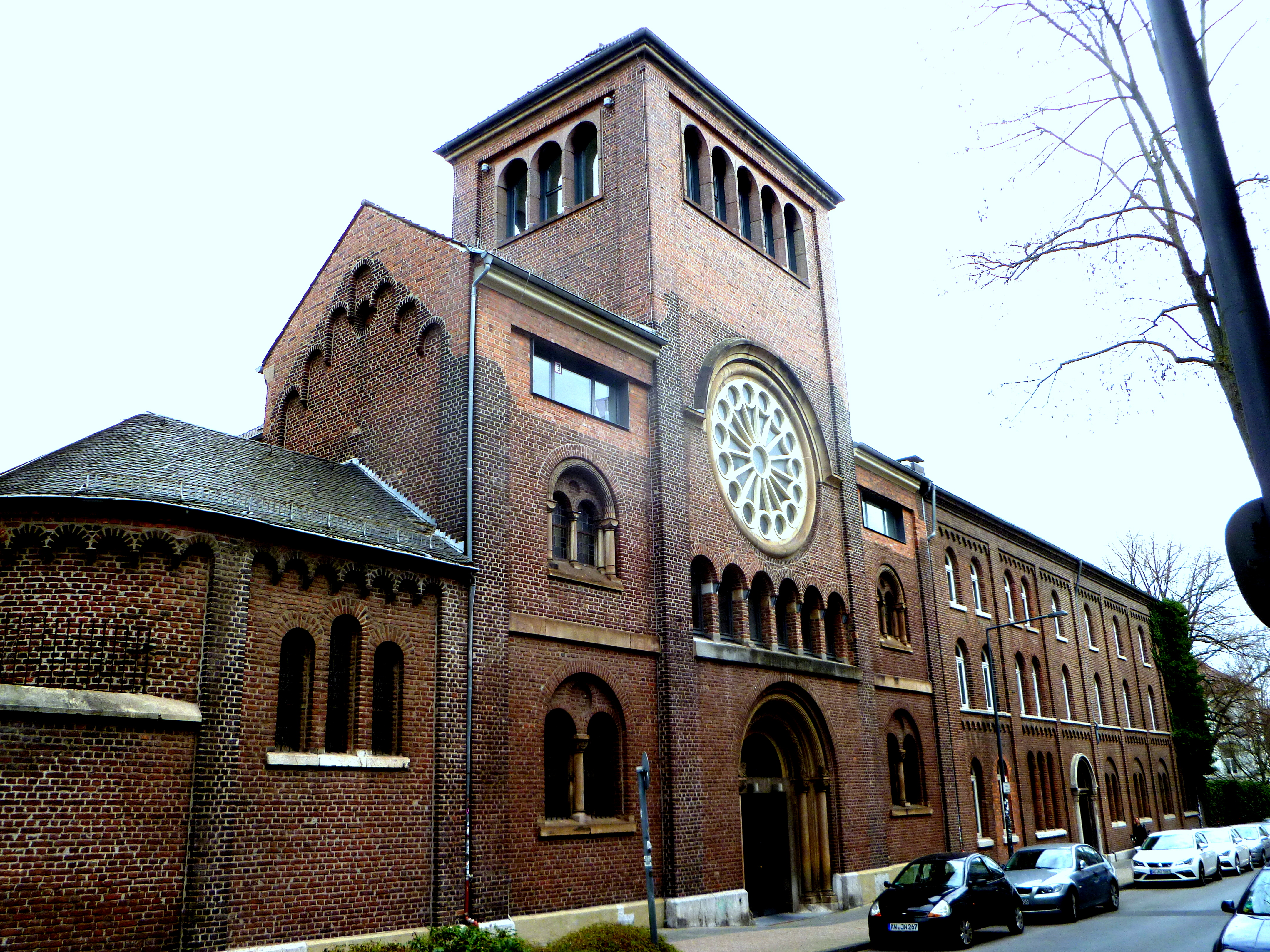 ehemaliges Baudenkmal im Frankenberger Viertel in Aachen und ehemaliges Kloster St. Alfons